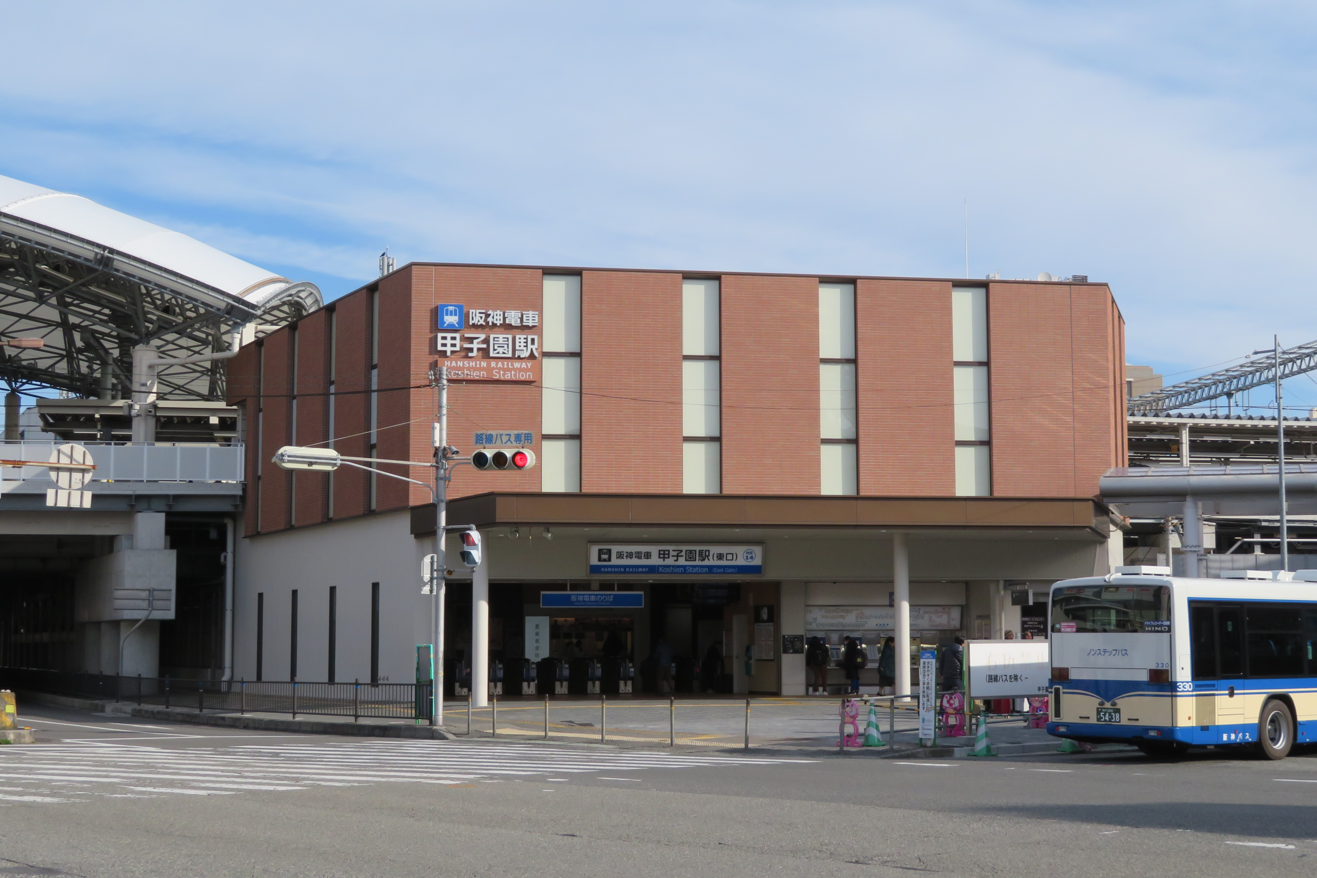 阪神甲子園駅東口